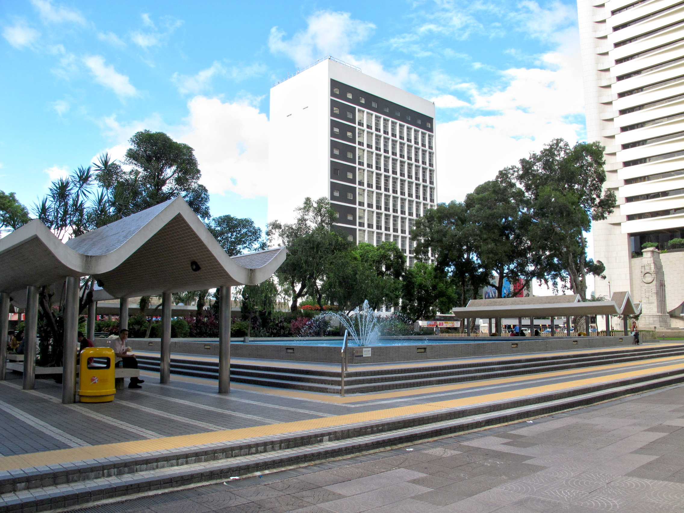 Statue Square Fountain